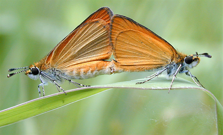 Skippers mating, Carver Park Reserve, Minnesota